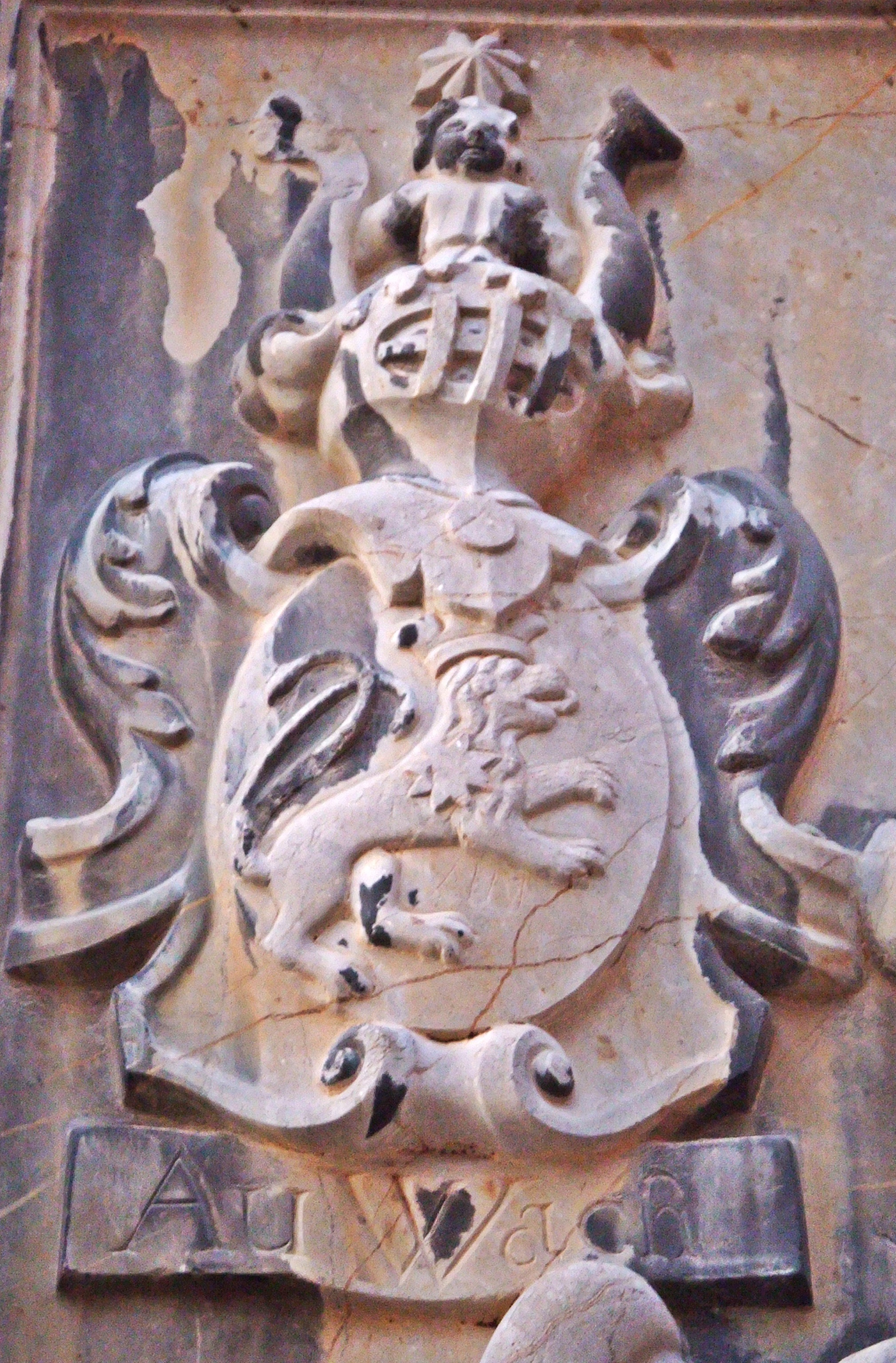 Wappen der Freiherrn von Auwach (mit Helmzier), am Epitaph des Domherrn Hermann Lothar von Auwach (+ 1722), südliche Außenseite des Speyerer Domes